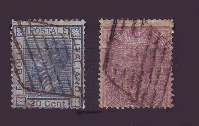 Francobolli del Regno d'Italia con annullo a rombi pontificio, utilizzati in alcuni uffici del Lazio e dell'Umbria nel periodo di transizione.